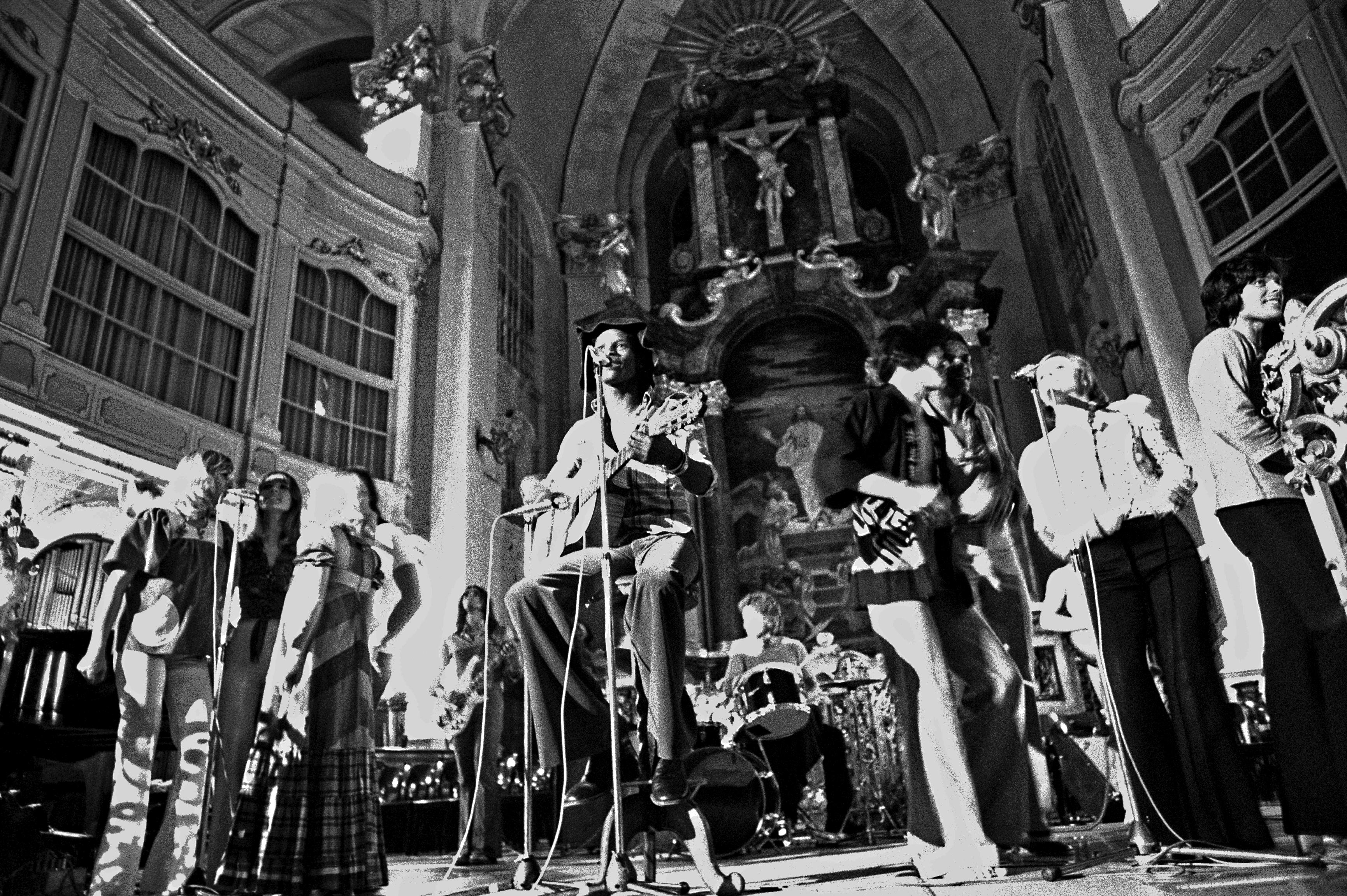 Die Les Humphries Singers in der Hamburger St. Michaelis-Kirche, 1972 Mehr Rock- und Pop-Archiv